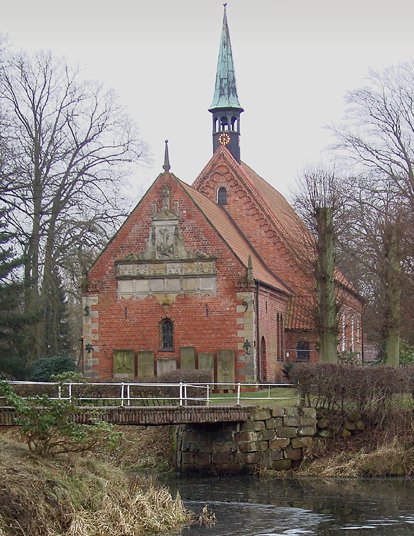 St.Gabriel in Haseldorf vom Gutspark aus (2002)